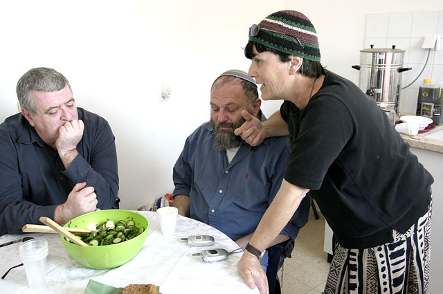 אפי ועילית איתם מארחים את אמנון דנקנר עורך מעריב בנצר חזני באדיבות קטיף.נט , צילם: מוטי סנדר.